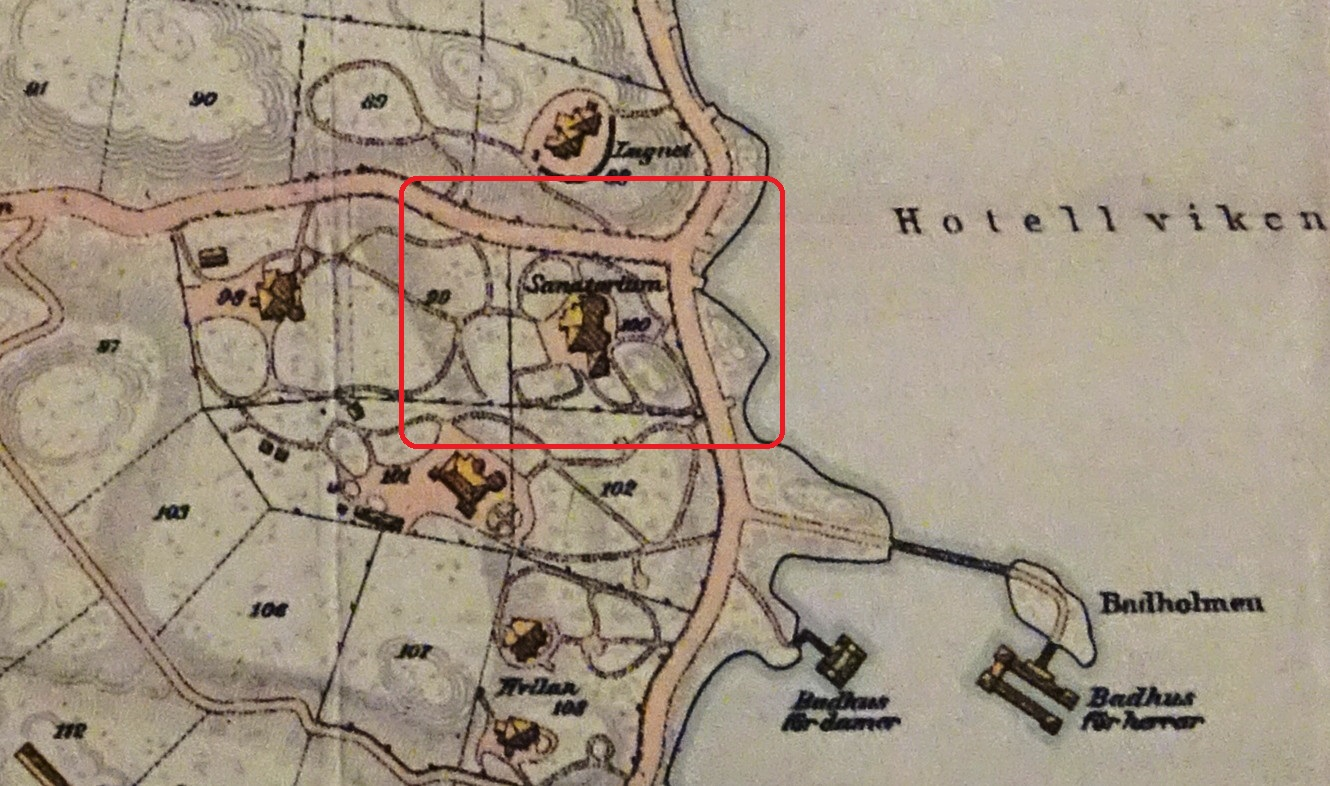 Del av Karta över Saltsjöbaden visande Saltsjöbadens sanatotium